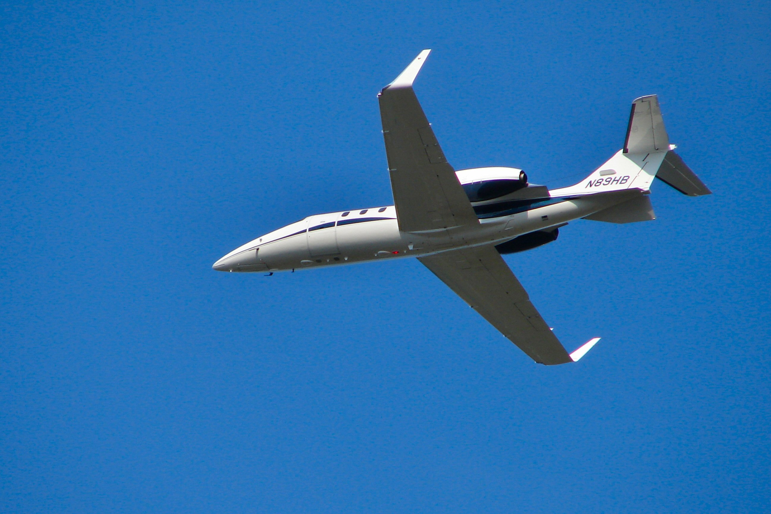 Learjet 31